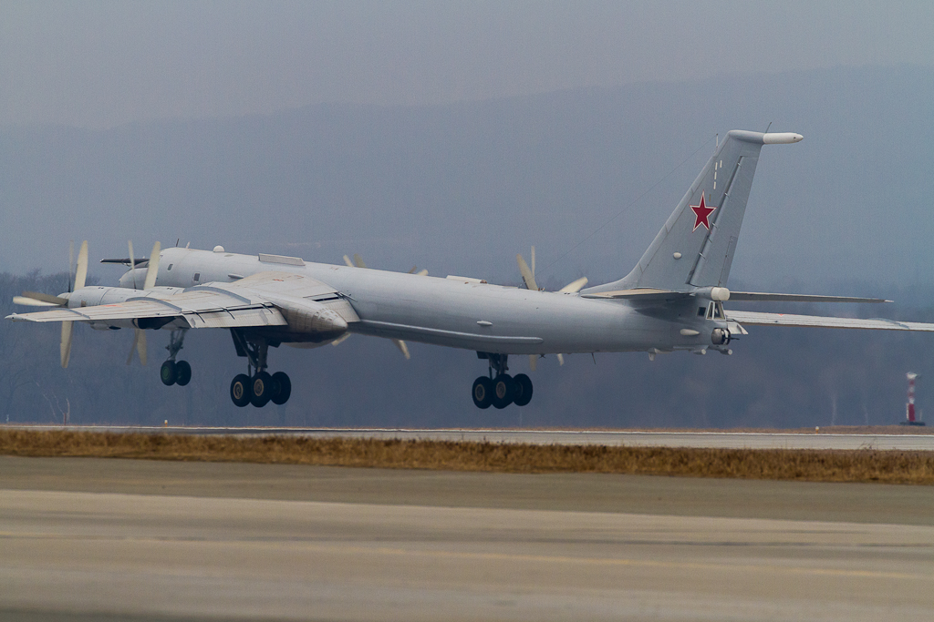 _MG_0383-2